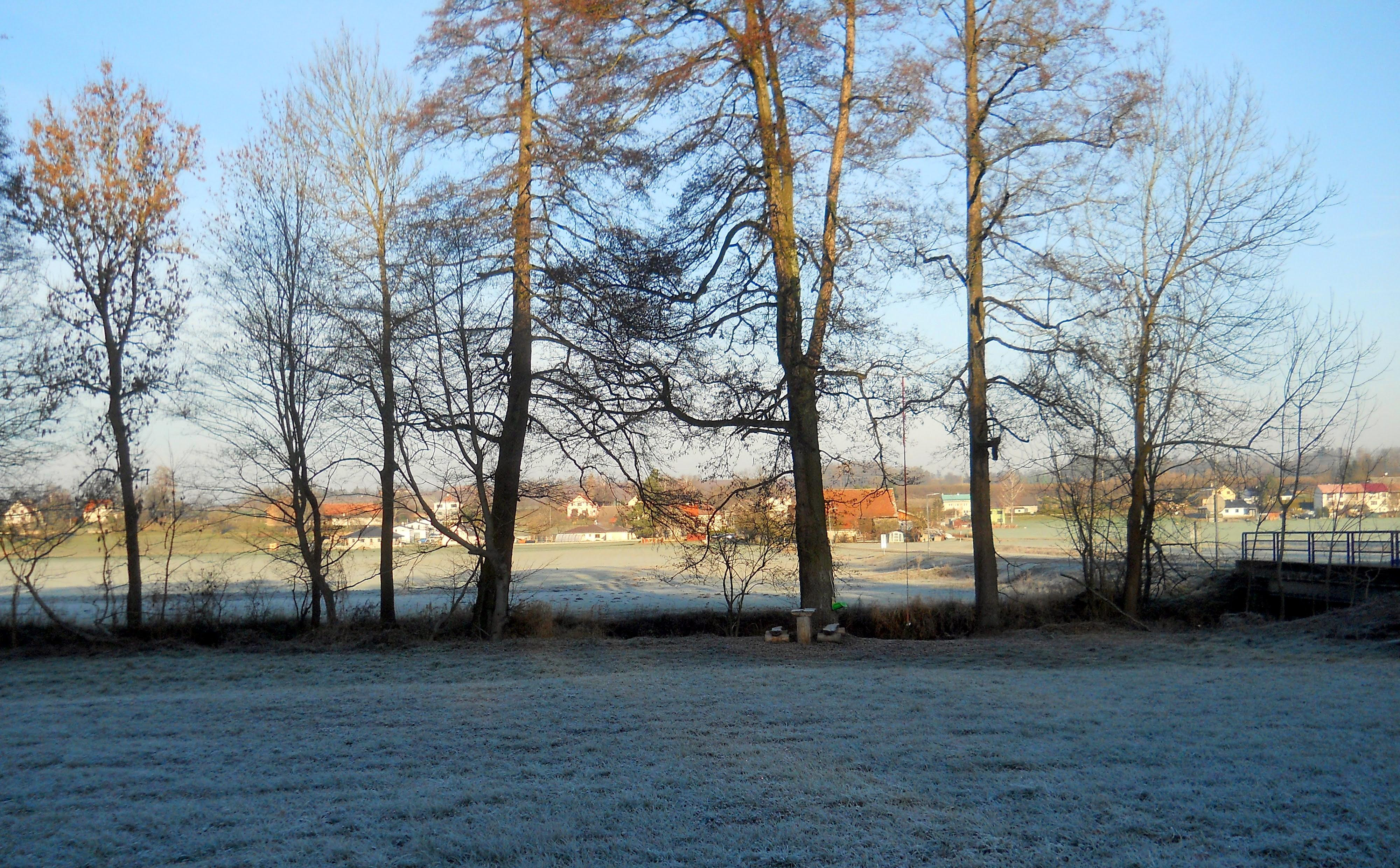 Synkov-Slemeno